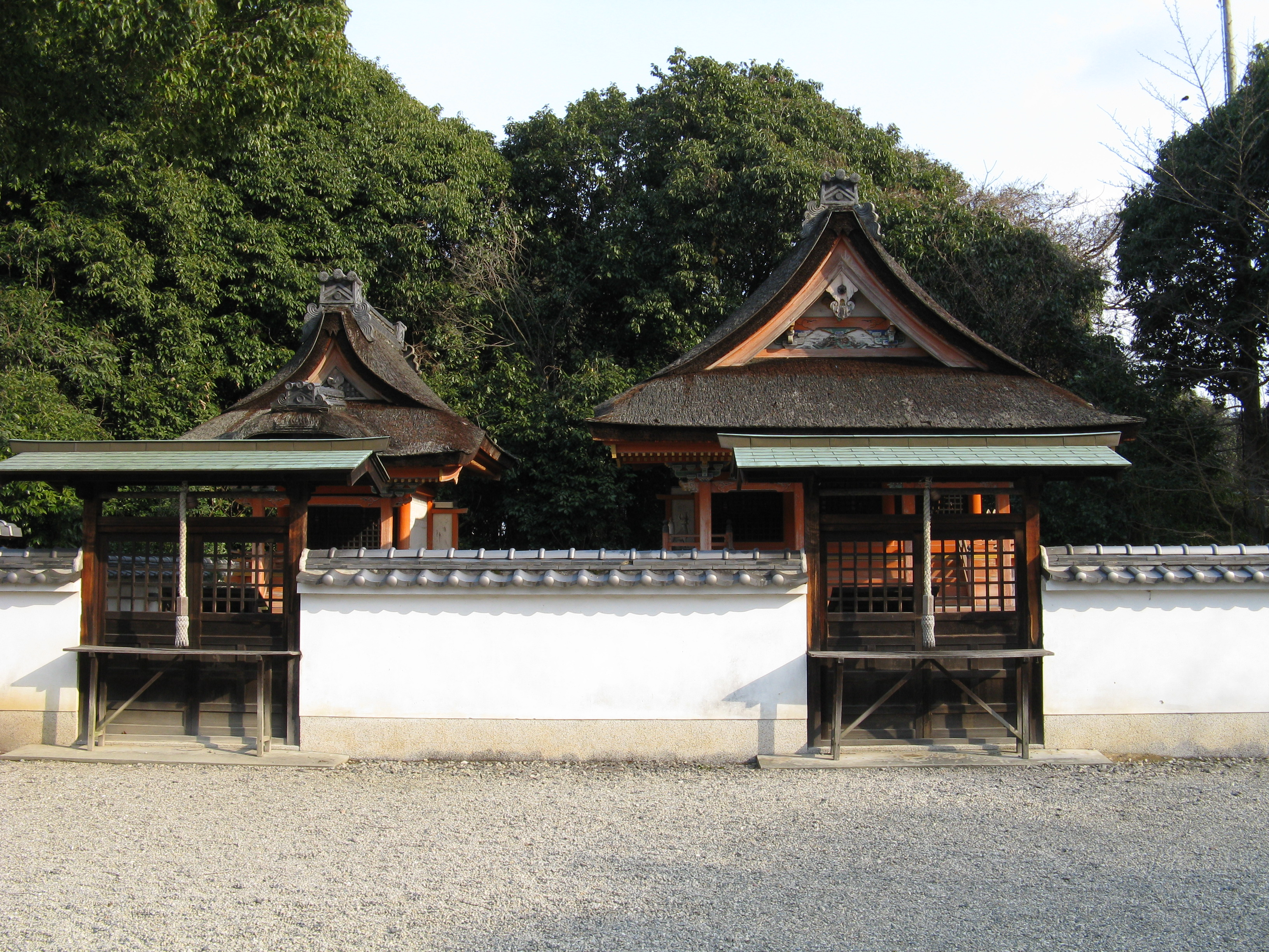 聖神社 瀧神社・三神社